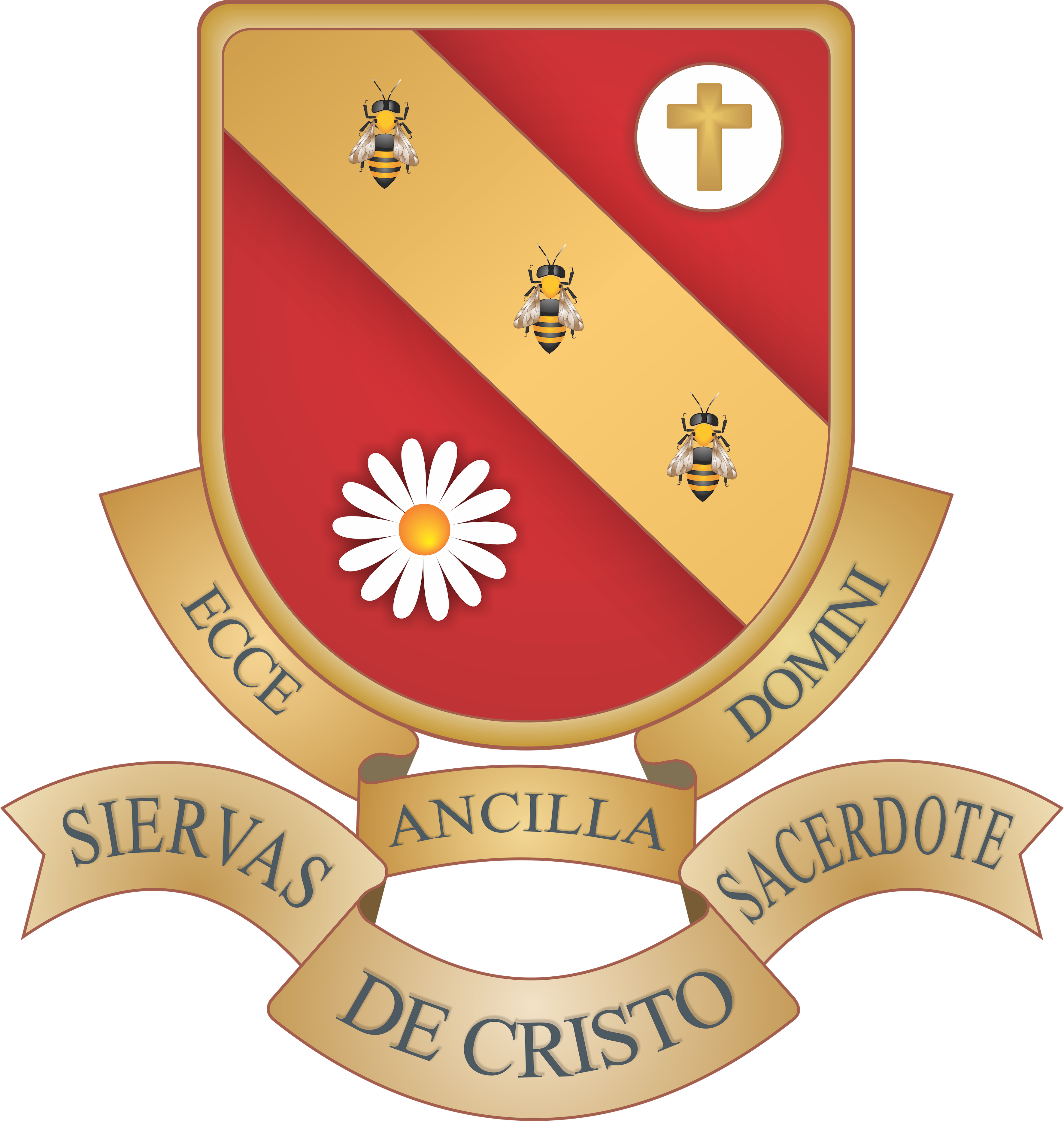 Se caracteriza por tener 3 abejas obreras, caracteristica de su obra permamente, una cruz sinbolo del cristianismo y la margarita como recuerdo de su fundadora.